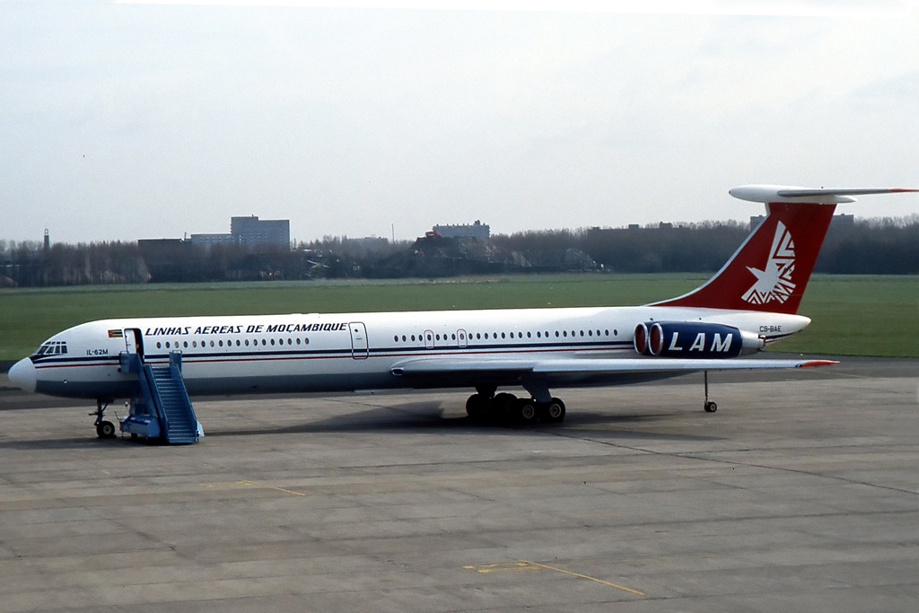 Linhas Aéreas de Moçambique Ilyushin Il-62 at Rotterdam